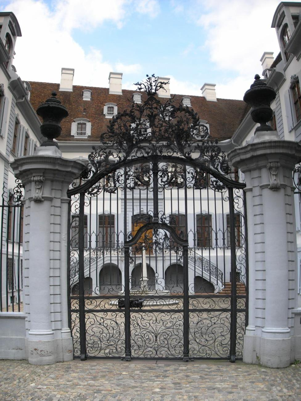 Blaues Haus (Reichensteinerhof) erbaut 1762-68 von Samuel Werenfels (1720-1800) als Wohn- und Geschäftshaus für den Seidenfabrikanten Lukas Sarasin. Lange Zeit Sitz des Justizdepartementes. Seit der Verwaltungsreform im Jahre 2009 Sitz des Departementes für Wirtschaft, Soziales und Umwelt des Kantons Basel-Stadt.